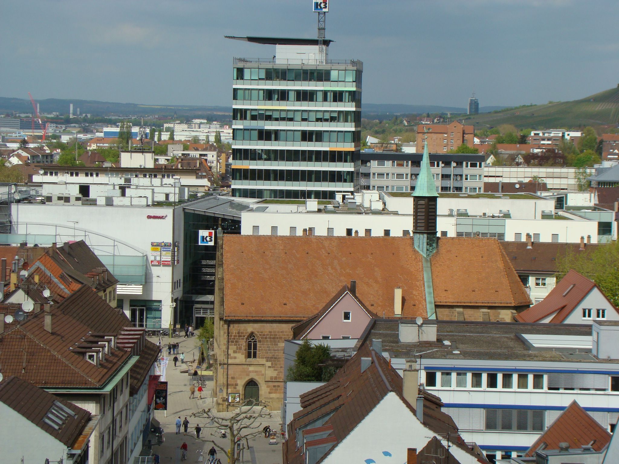 Nicolaikirche in Heilbronn, dahinter Theaterforum K3, Blick vom Hafenmarktturm